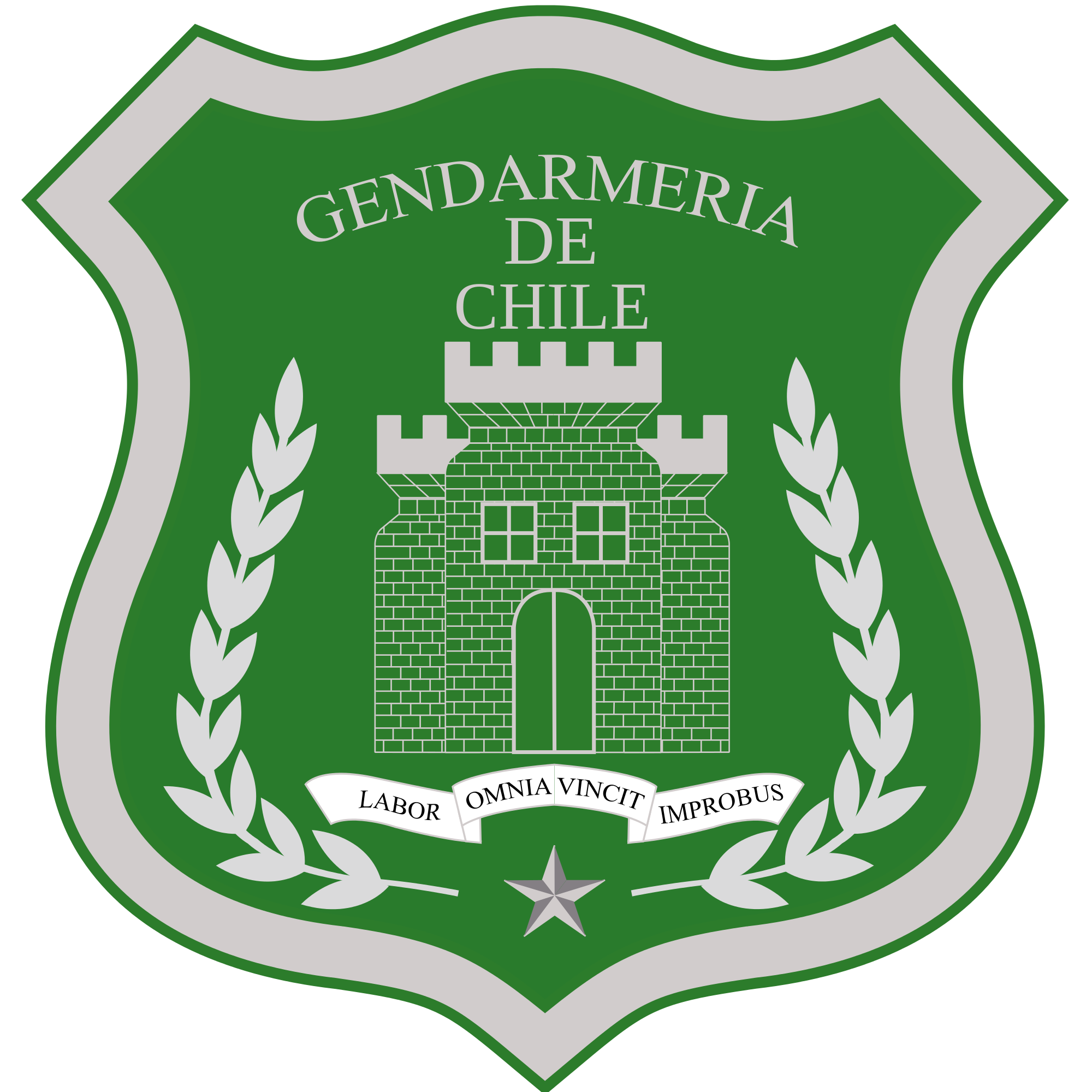 Artículo 33° Res. Ex. N° 3282 de fecha 27.03.2014. "El escudo de Gendarmería de Chile estará constituido por una armadura, cuyo fondo será verde alemán con ribete plateado. En su interior y al centro llevará inserto el símbolo institucional, color plateado, sobre él la leyenda “GENDARMERÍA DE CHILE”, y bajo éste el lema “LABOR OMNIA VINCIT IMPROBUS” en letras del mismo color, inserto en una cinta plateada con un ribete más oscuro. Tanto el Torreón Almenado, como el lema institucional, irán enmarcados por dos ramas de encino que nacen a partir de una estrella de cinco puntas ubicada en el centro inferior de la armadura. Las ramas de encino y la estrella serán plateadas.